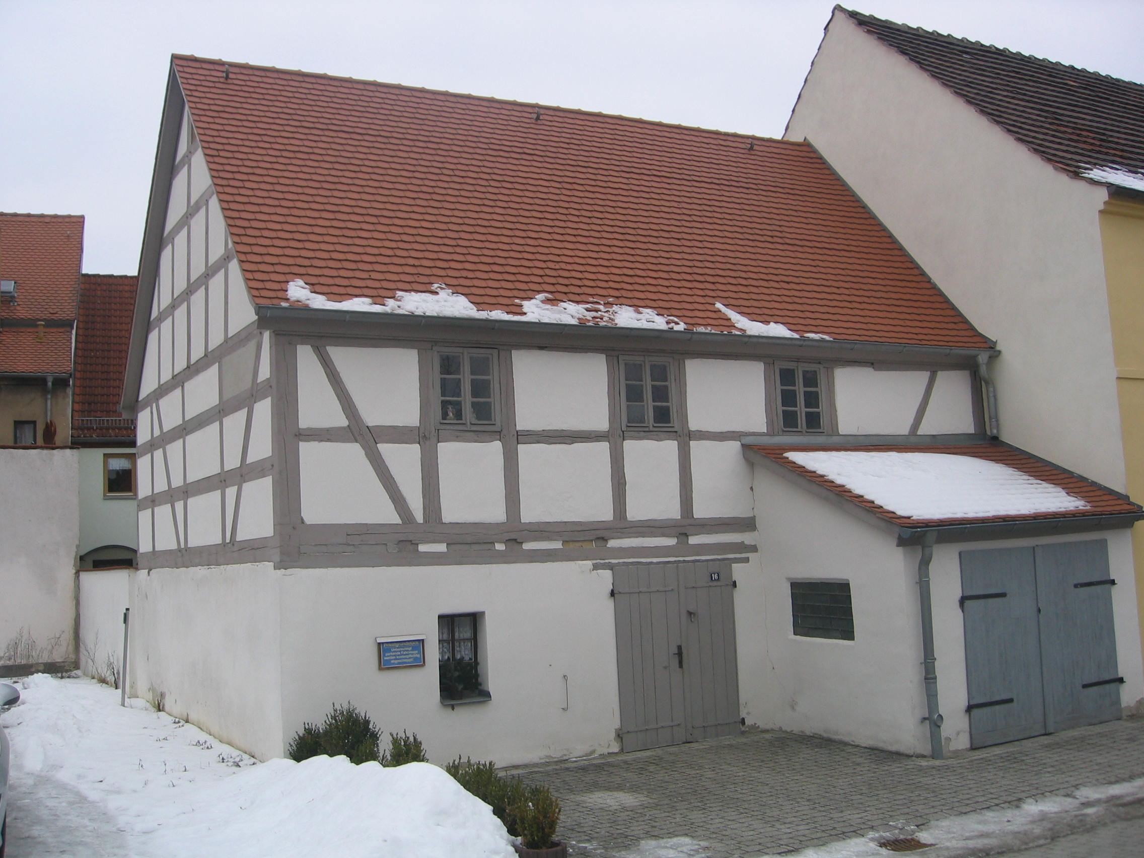 Ruhland, Berliner Straße 16, Nebengebäude Kirchgasse, Südostansicht; Fachwerkobergeschoss